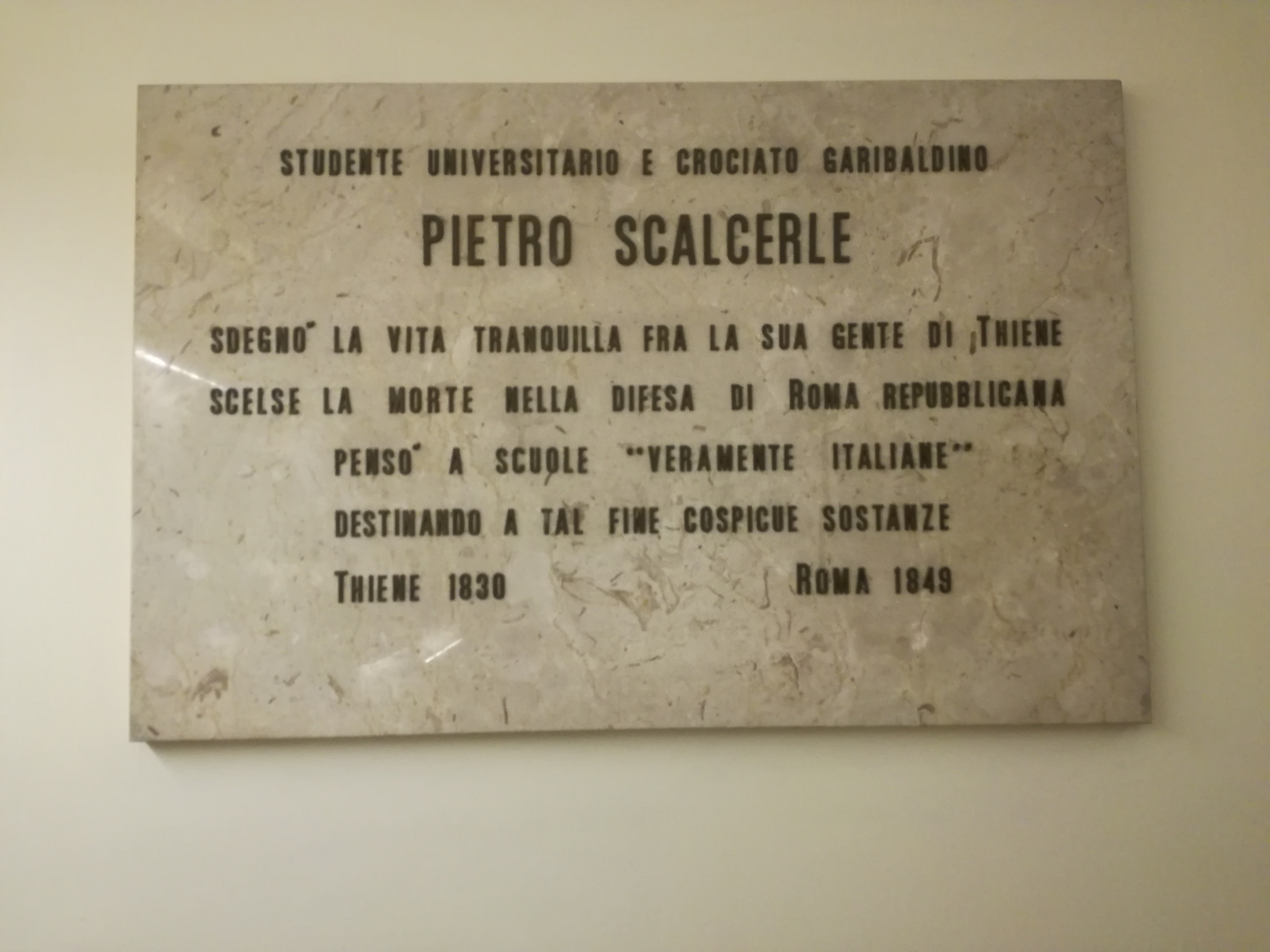 La targa che ricorda Scalcerle presso l'attuale IIS Usuelli Ruzza di Padova, in via Sanmicheli (una delle prime sedi storiche dell'Istituto, dal 1937)